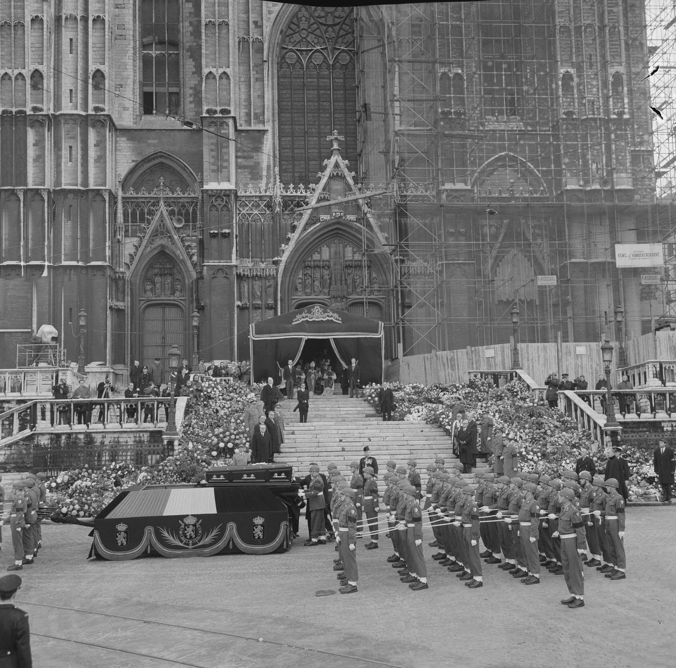 Collectie / Archief : Fotocollectie Anefo Reportage / Serie : [ onbekend ] Beschrijving : Begrafenis van Koningin Elizabeth van België te Brussel; het stoffelijk overschot tijdens de aankomst bij de Kathedraal van Sint Michiel en Sint Goedele Datum : 30 november 1965 Locatie : België, Brussel Trefwoorden : begrafenissen, kathedralen, militaire parades, vorstenhuizen Persoonsnaam : Elizabeth, koningin van België Fotograaf : Nijs, Jac. de / Anefo Auteursrechthebbende : Nationaal Archief Materiaalsoort : Negatief (zwart/wit) Nummer archiefinventaris : bekijk toegang 2.24.01.03 Bestanddeelnummer : 918-5094